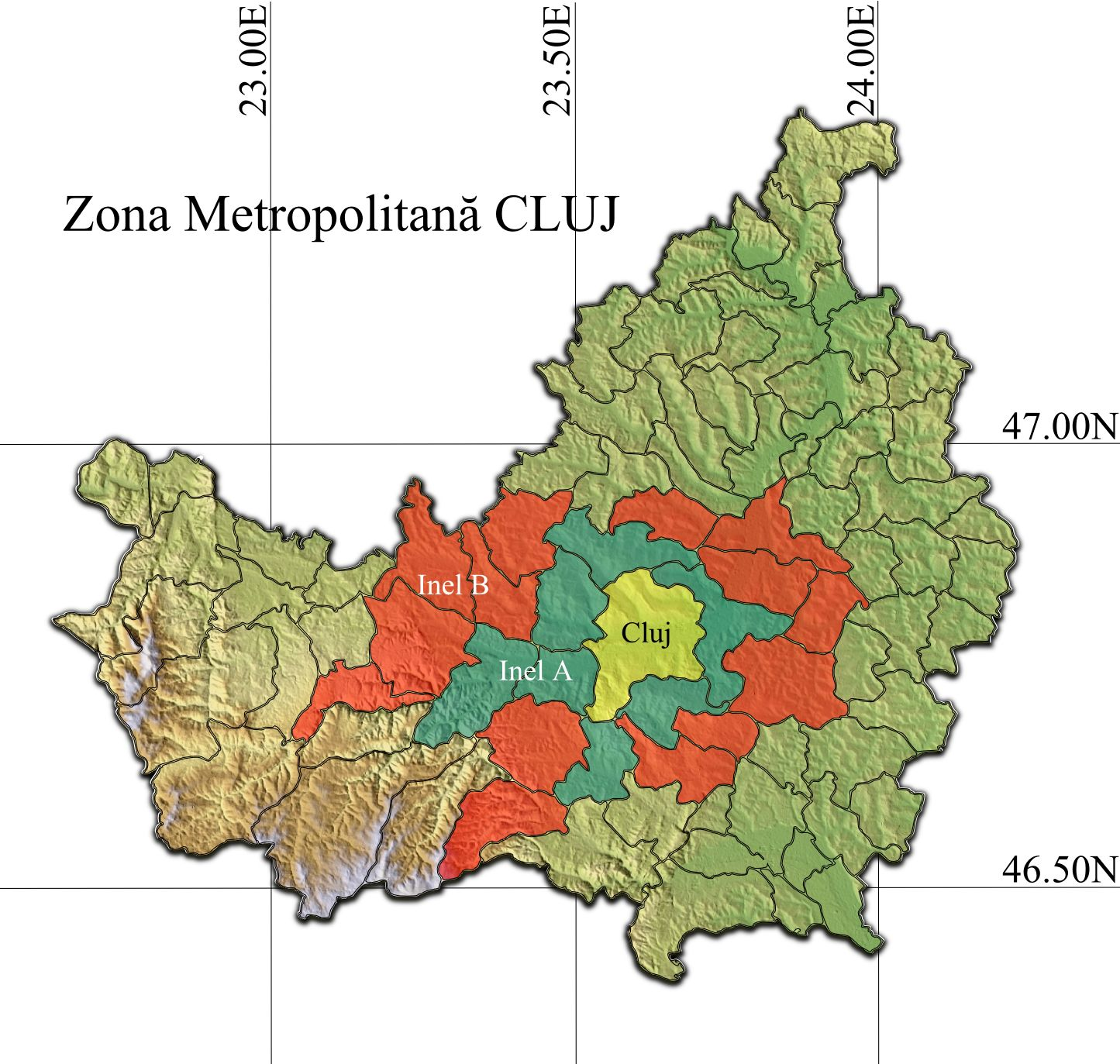 Zona metropolitană Cluj